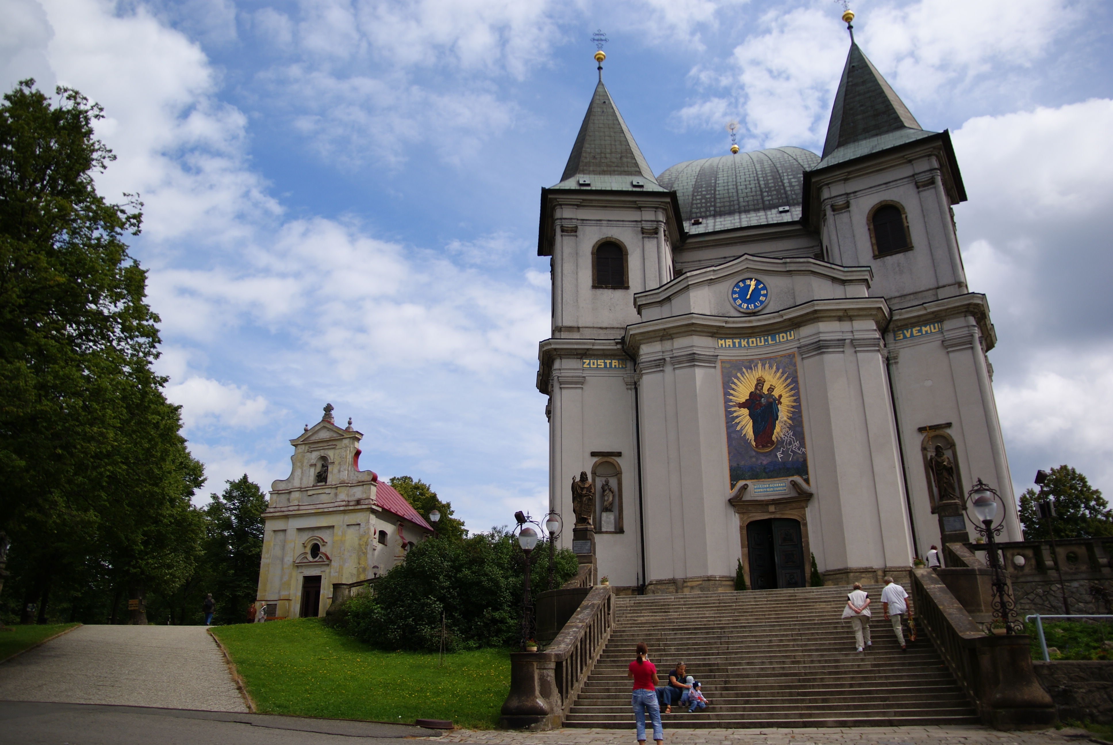 Kostel Nanebevzetí P. Marie na Sv. Hostýně (Chvalčov), Hostýn, Chvalčov